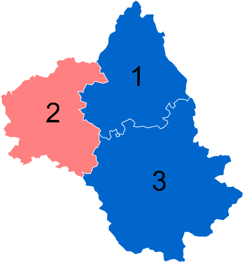 Résultats des élections législatives de l'Aveyron en 2012